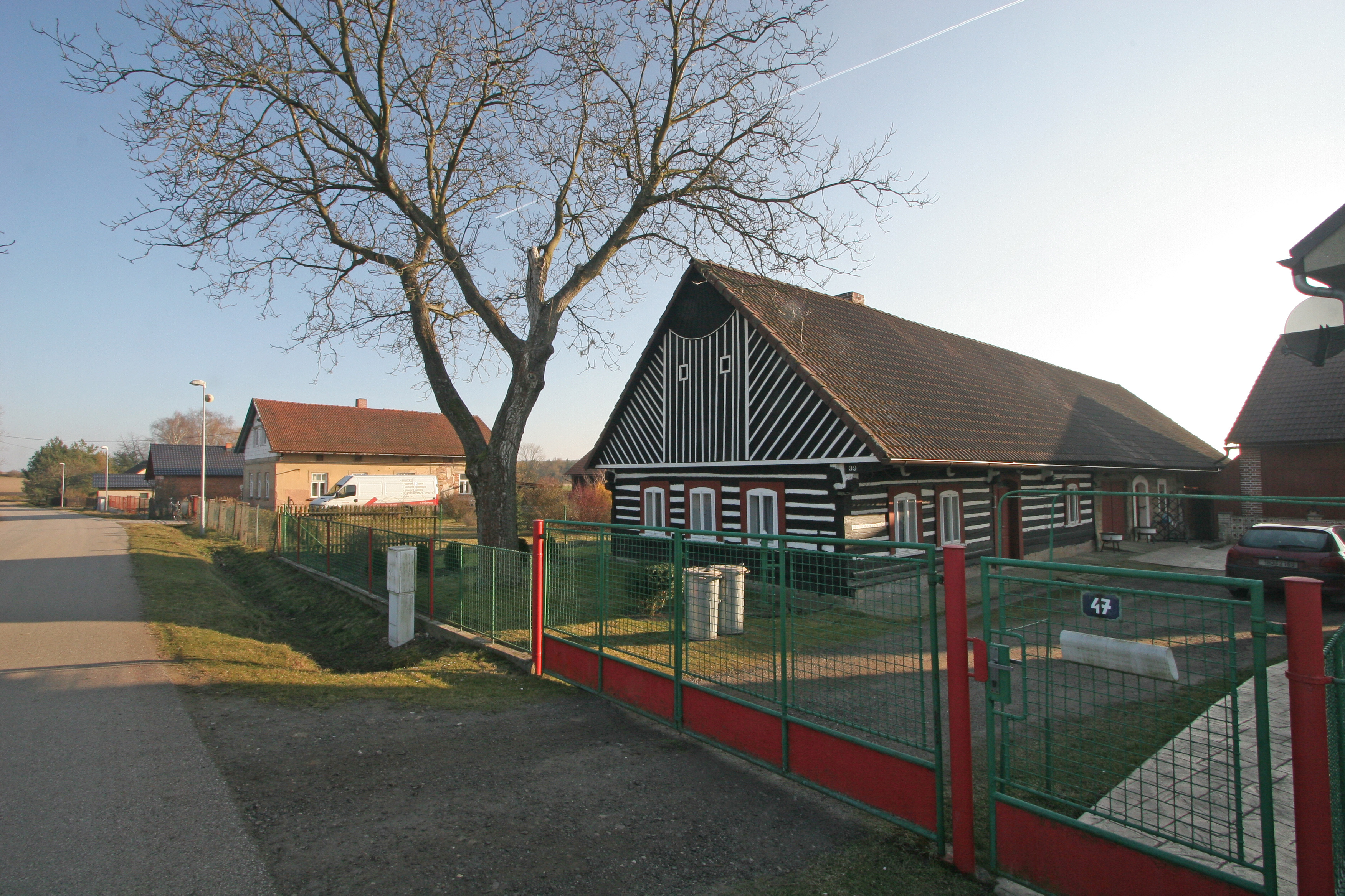 Kovač čp. 39